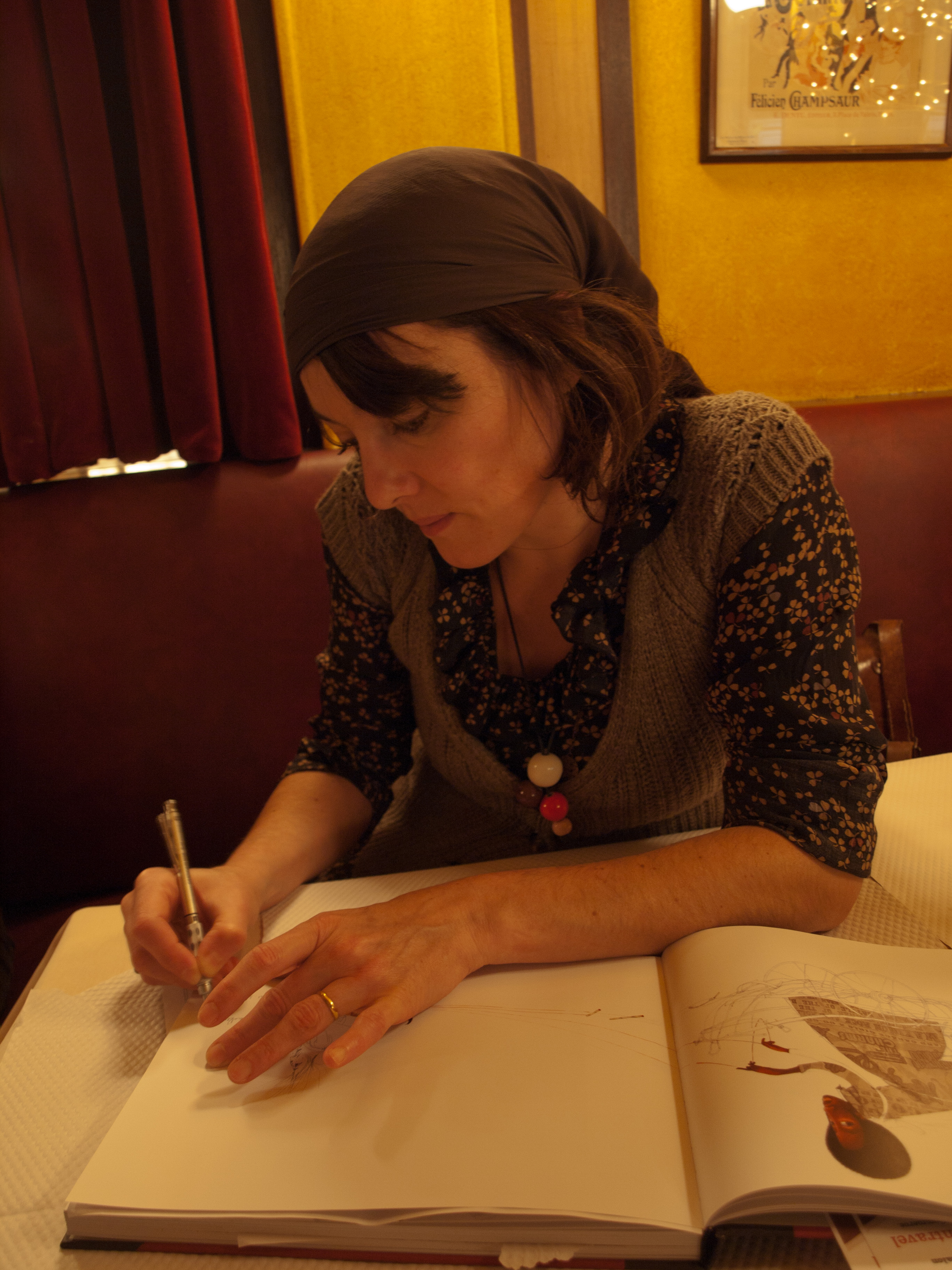 Rencontre / Dédicace avec 7 artistes du Sketchtravel : Rébecca Dautremer, Maïlys Vallade, Juanjo Guarnido, Eric Gosselet, François Roca, Dominique Bertail et Gérald Guerlais. Au Café du Commerce dans Paris 15e